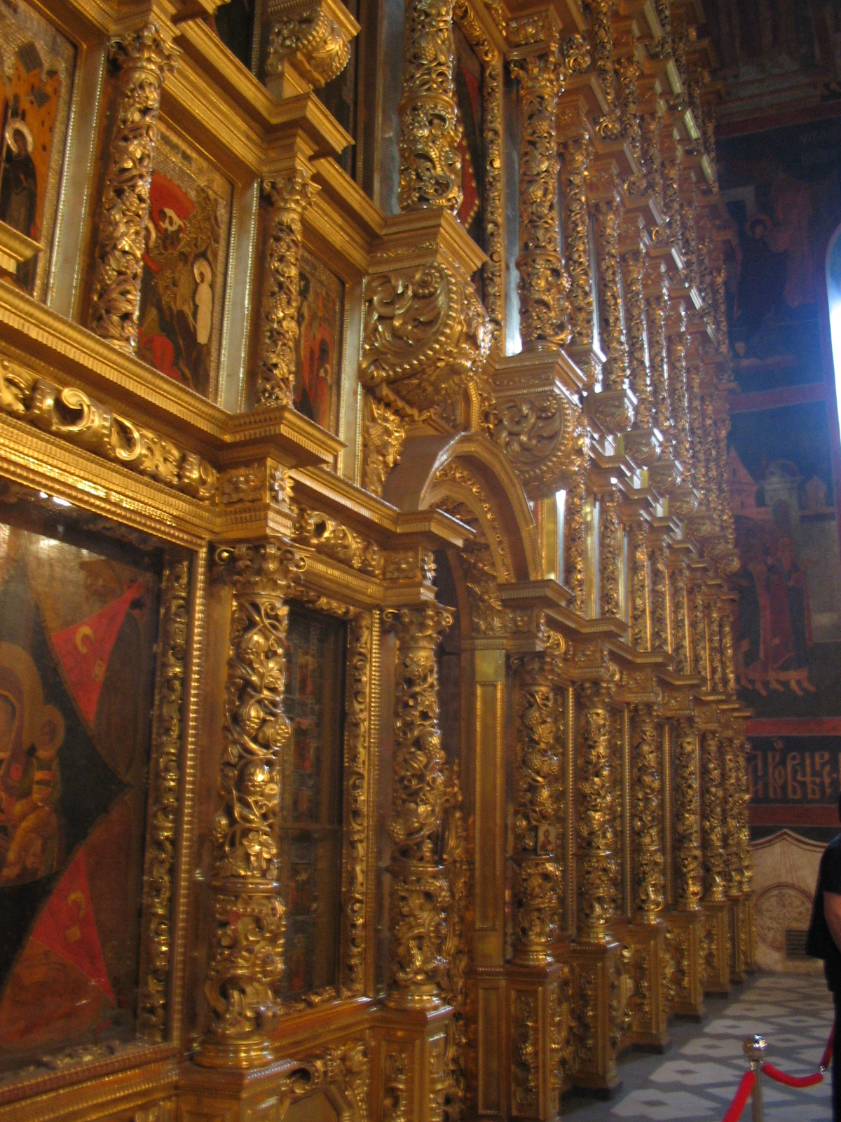 Новодевичий монастырь. Иконостас